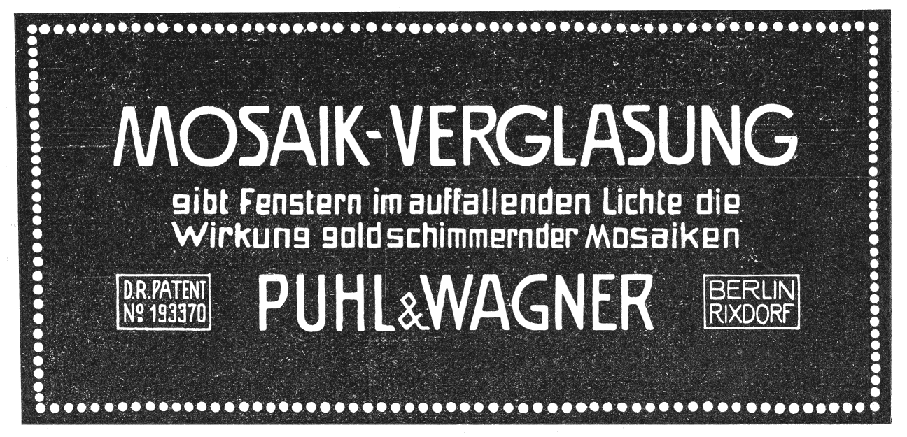 Inserat für Mosaikverglasung